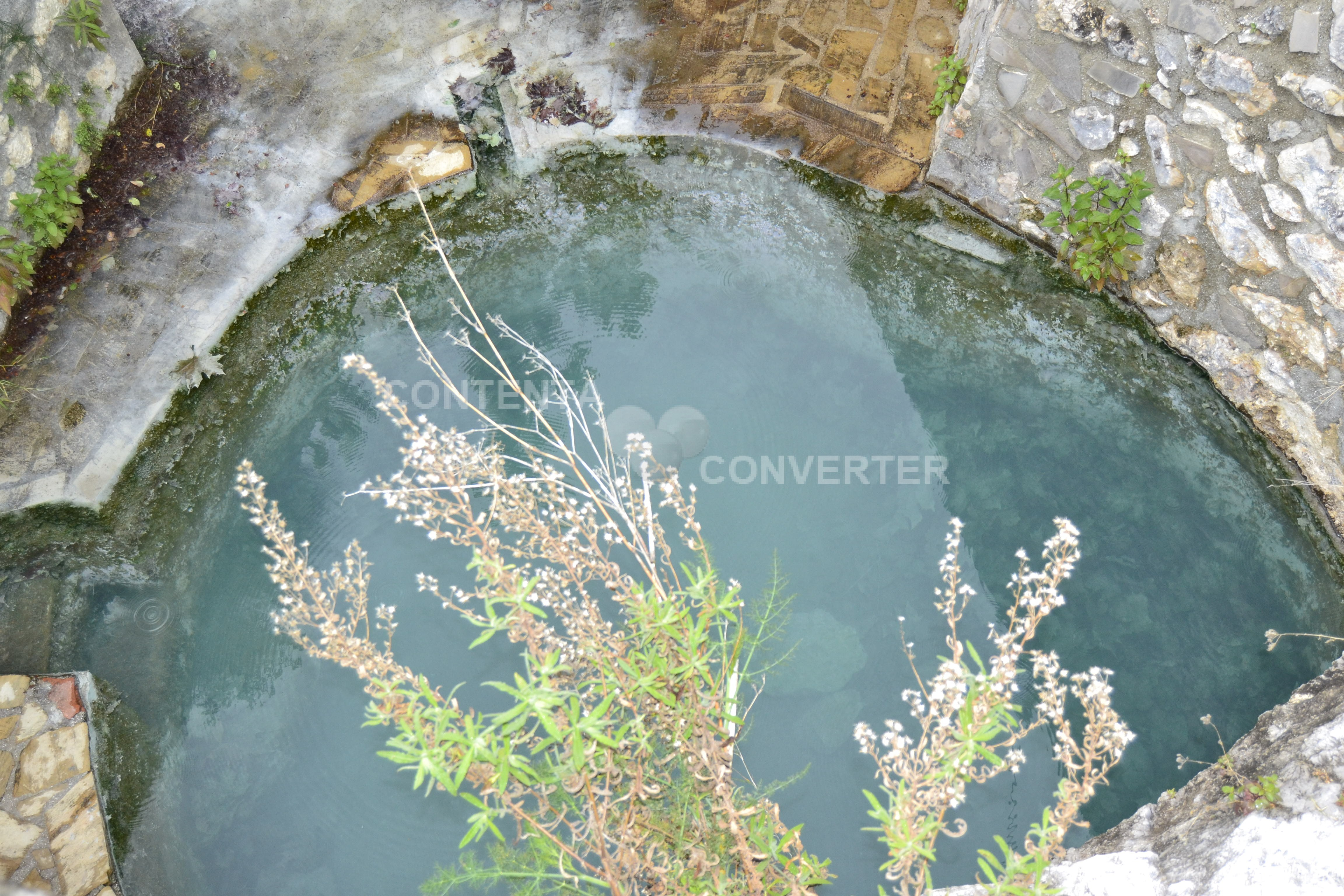 baños abr 12